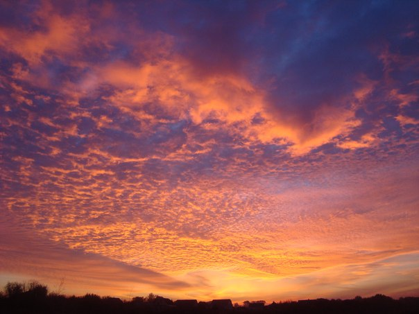 Захід сонця над селищем Безп'ятне. Поруч з головним кладовищем.